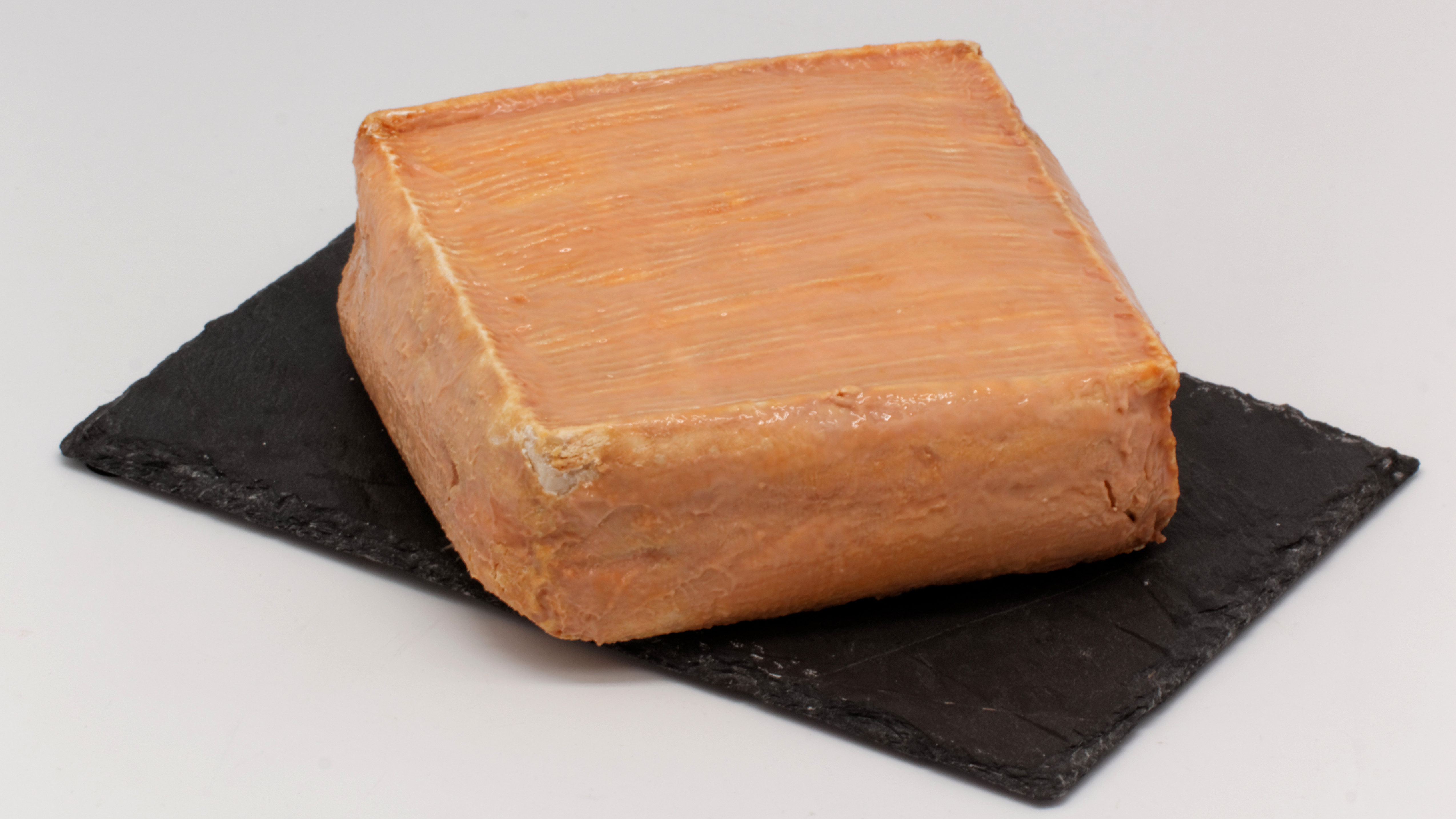 Maroilles; Androuet 17e